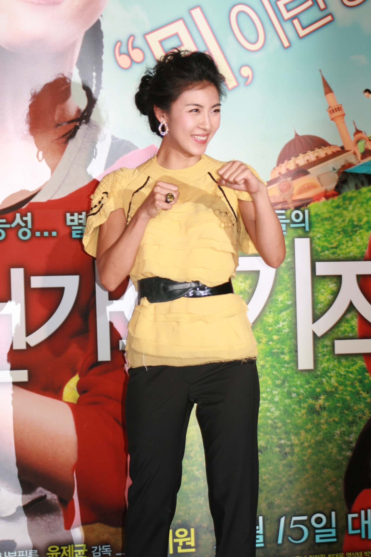 2007년 1월 26일 서울 용산CGV에서 열린 《1번가의 기적》 언론시사회에서의 하지원.